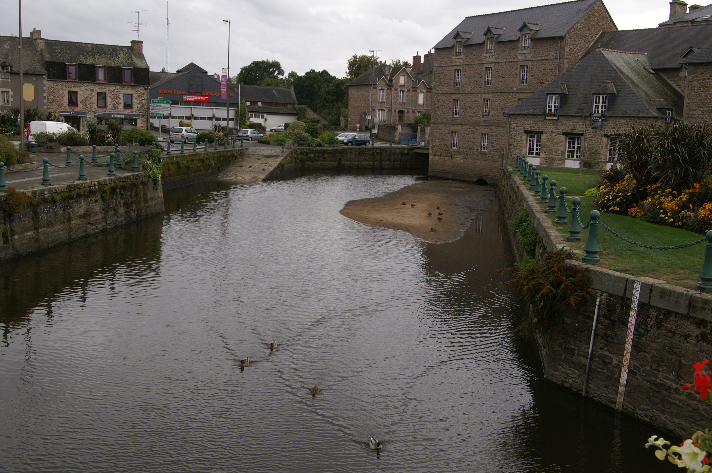 L'Arguenon à Plancoët.